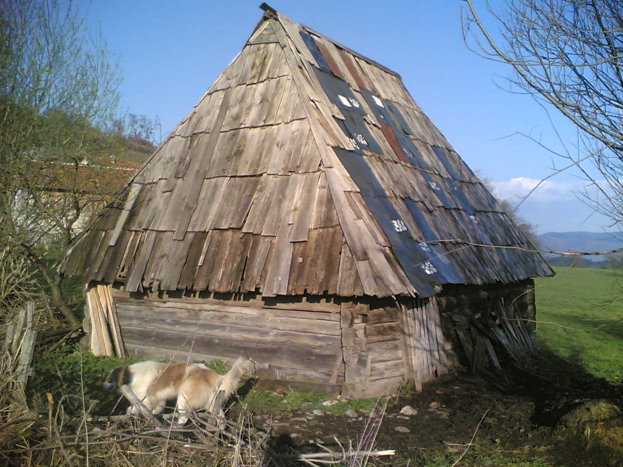 Аутор: Александар Мандић